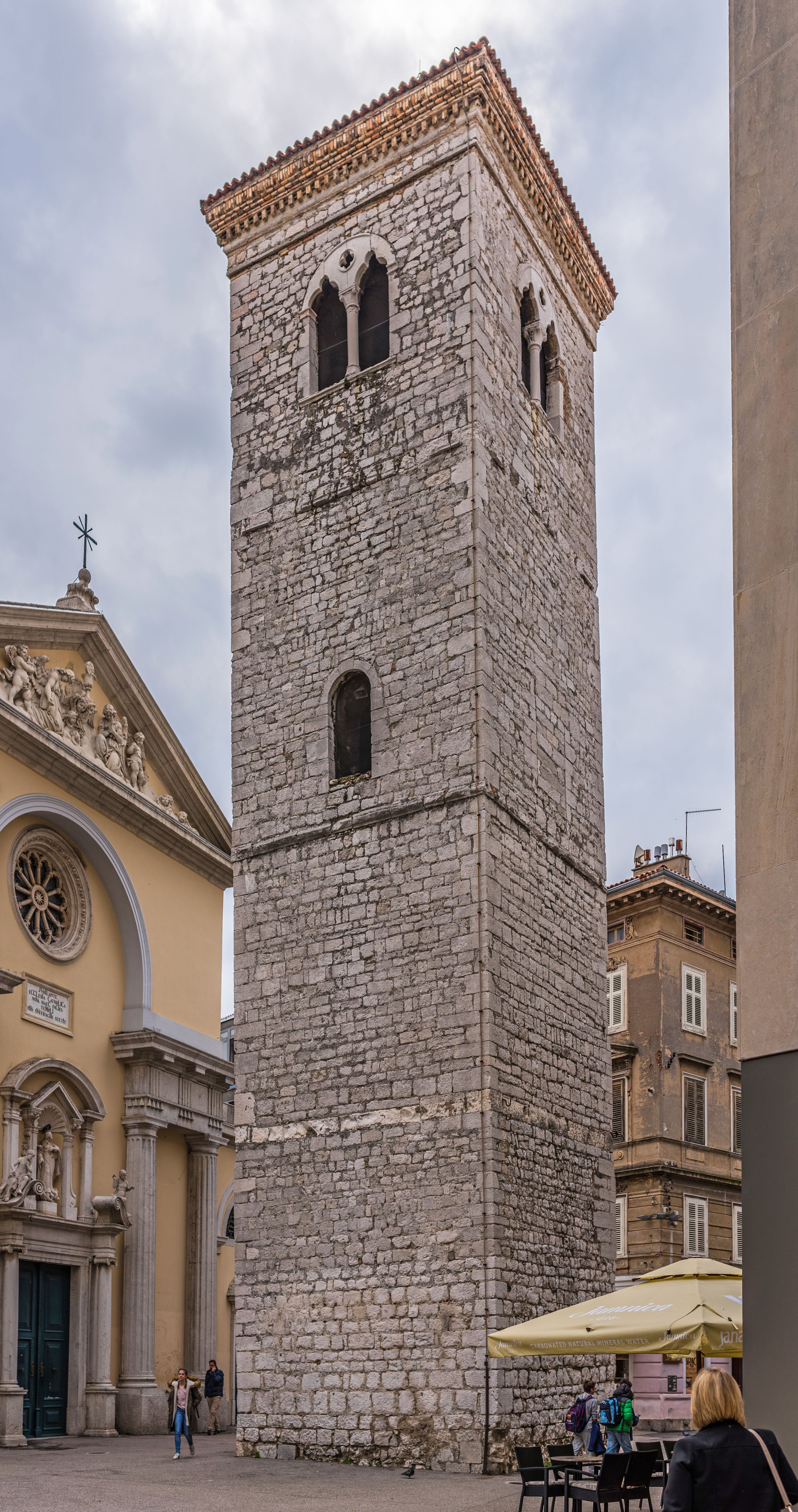 Rijeka Croatia November 2017